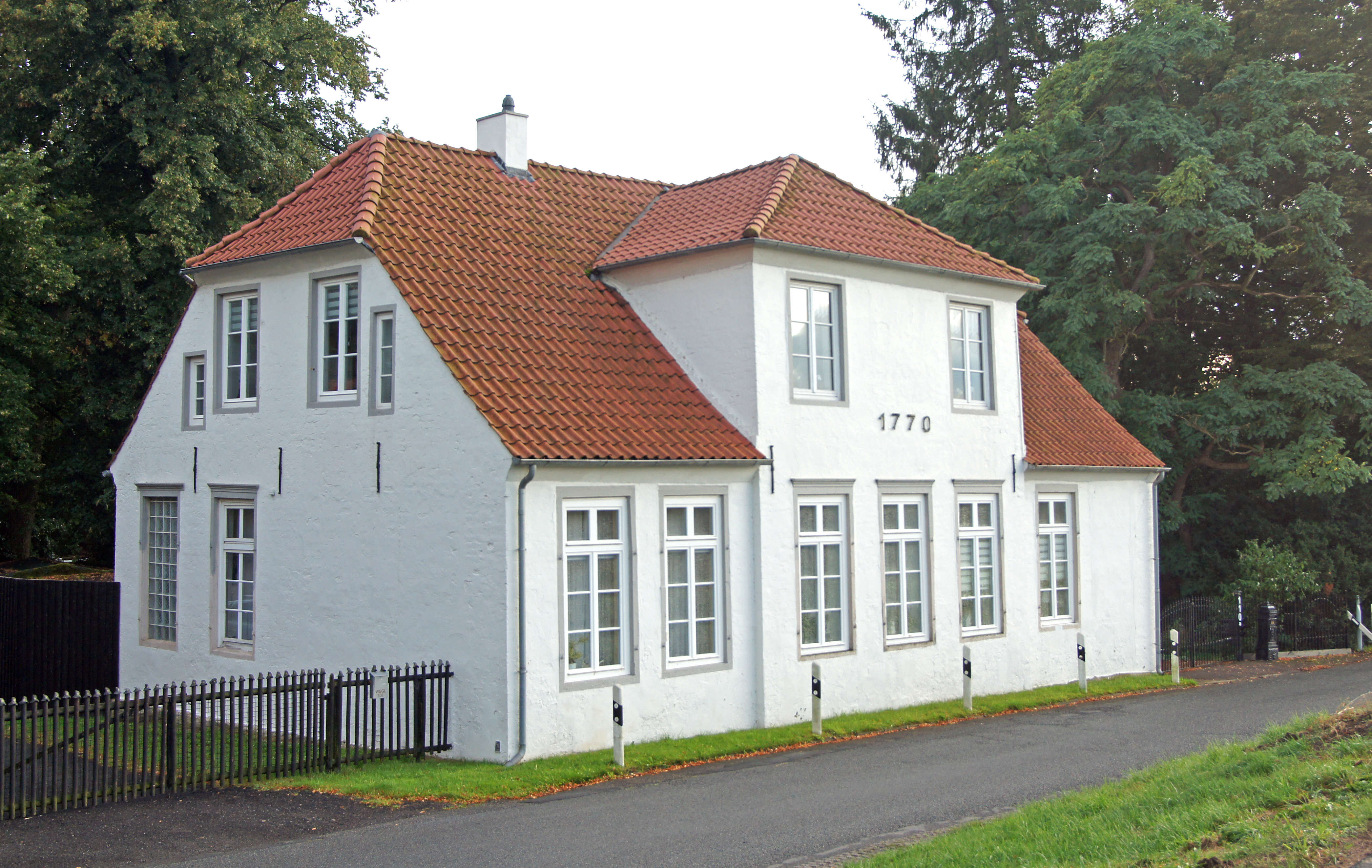 Doktorhaus in Bremen, Lesumbroker Landstraße 110Das abgebildete Objekt ist ein geschütztes Kulturdenkmal in der Freien Hansestadt Bremen, mit der Nr. 1297 beim Landesamt für Denkmalpflege registriert.